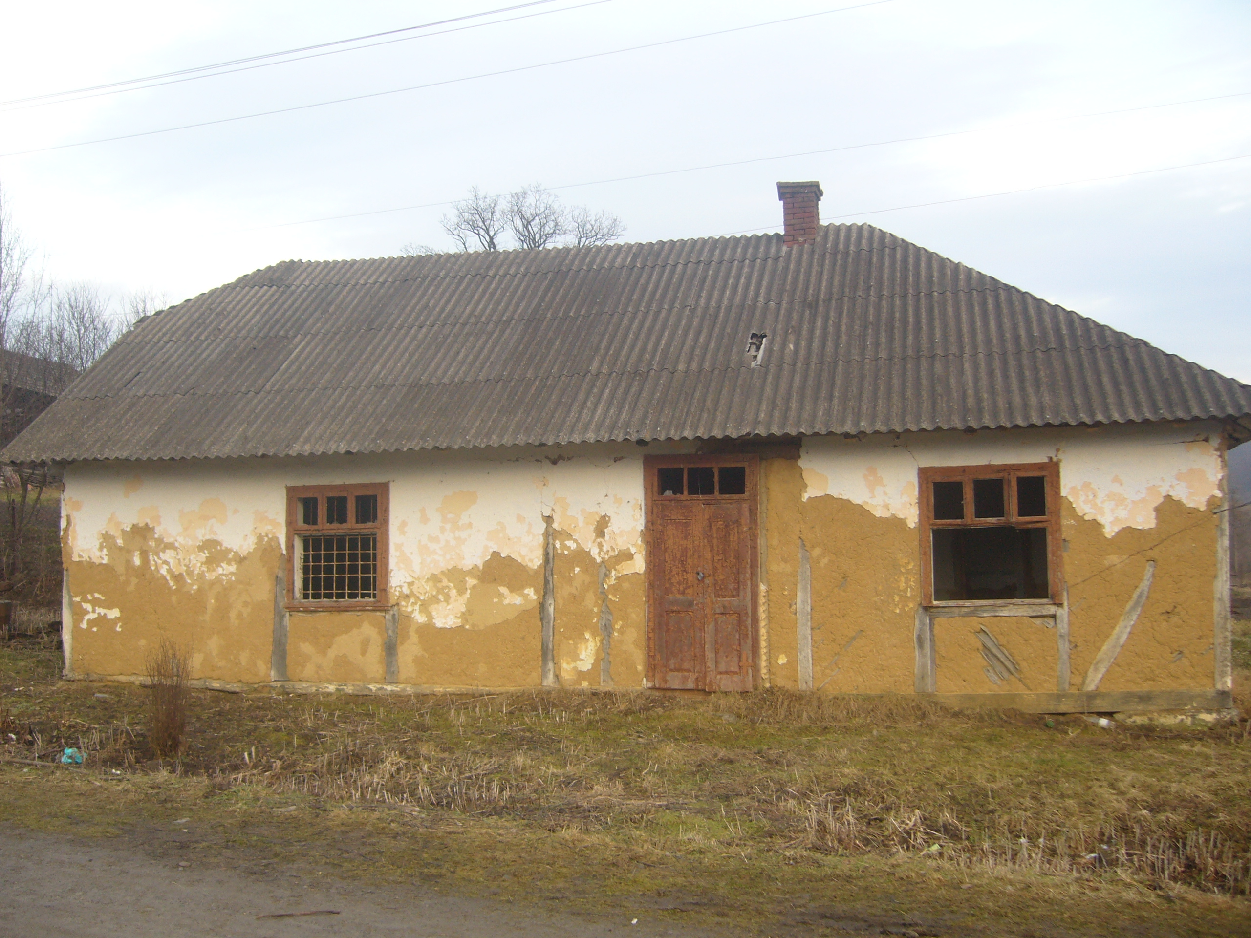 школа